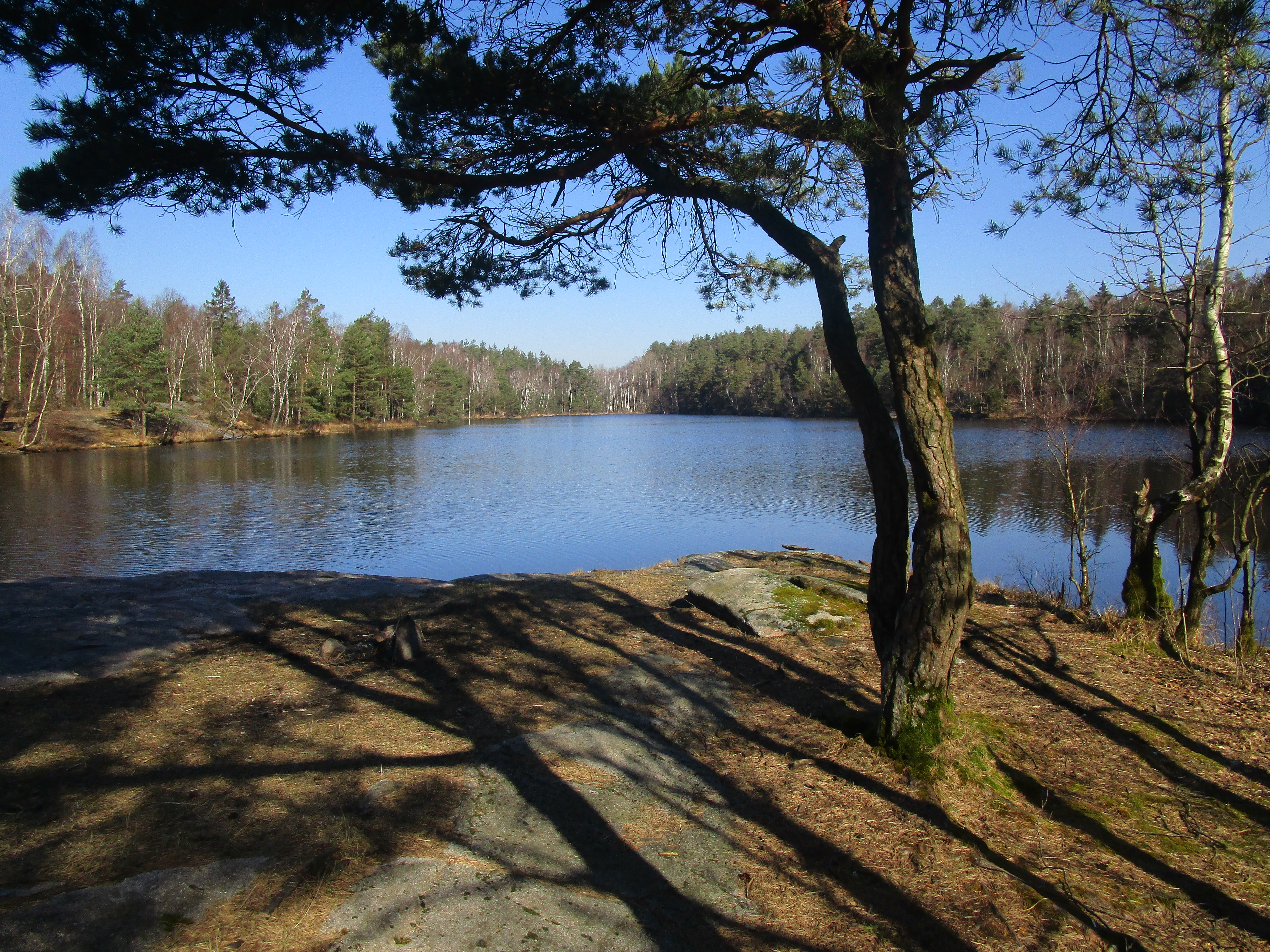 Östra Långevattnet riktning norr. 27 mars 2020.